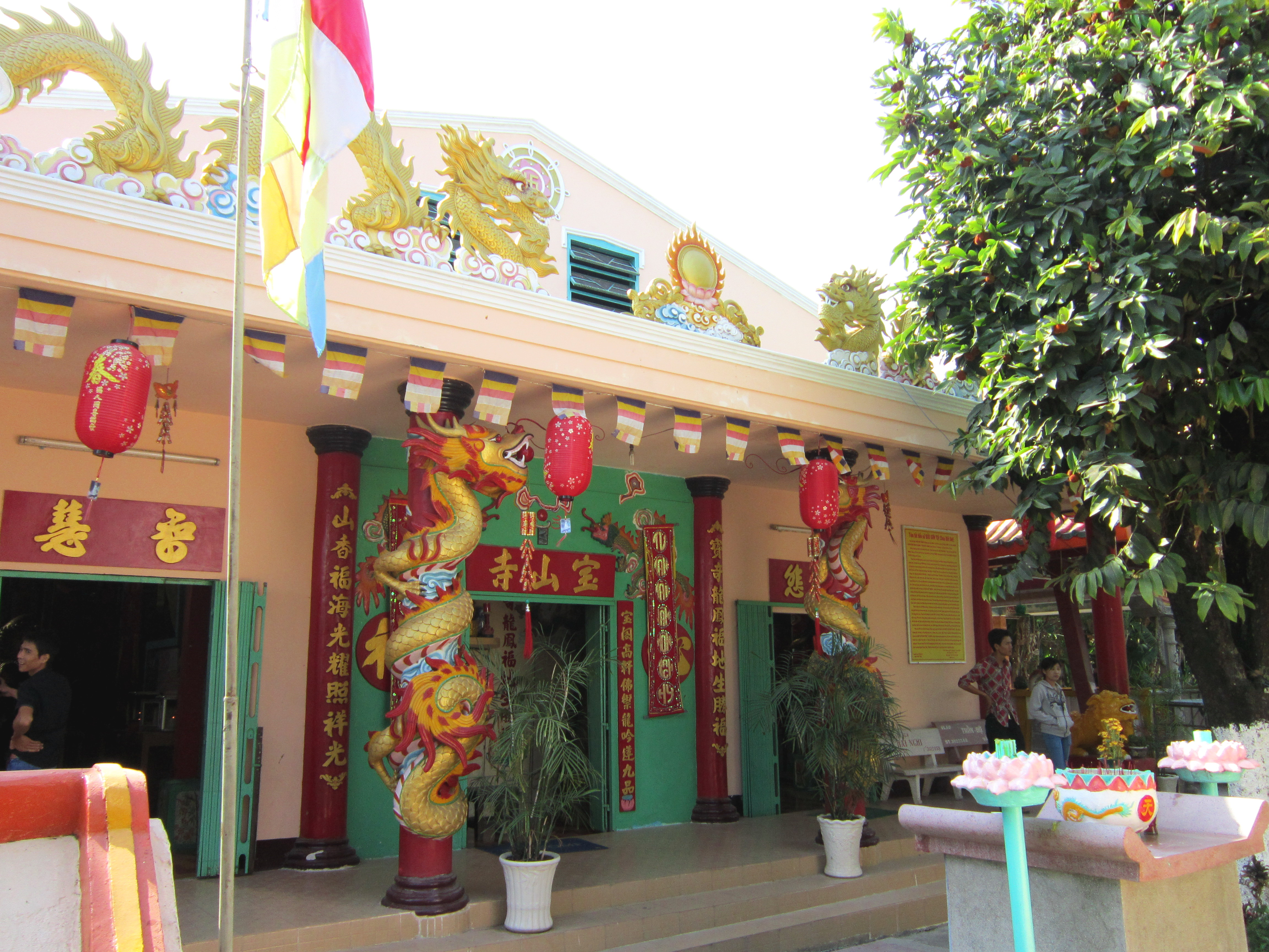 Bửu Sơn tự tục gọi là chùa Đất Sét, tọa lạc ở phường 5, TP. Sóc Trăng. Chùa nổi tiếng bởi những vật được tạo hình từ đất sét.